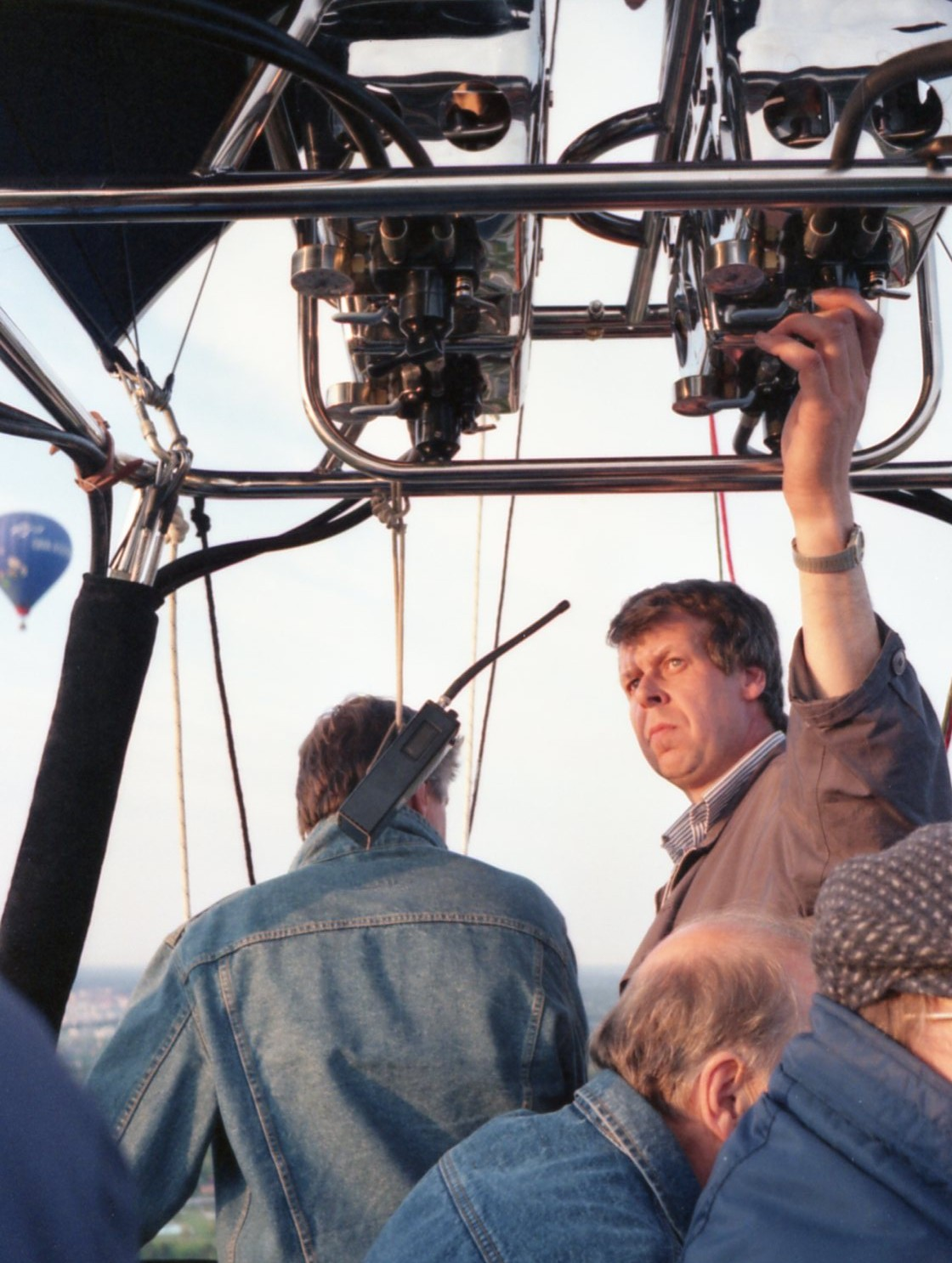 Ballongfararen eldar på, i varmluftsballong över Vällingby maj 1988